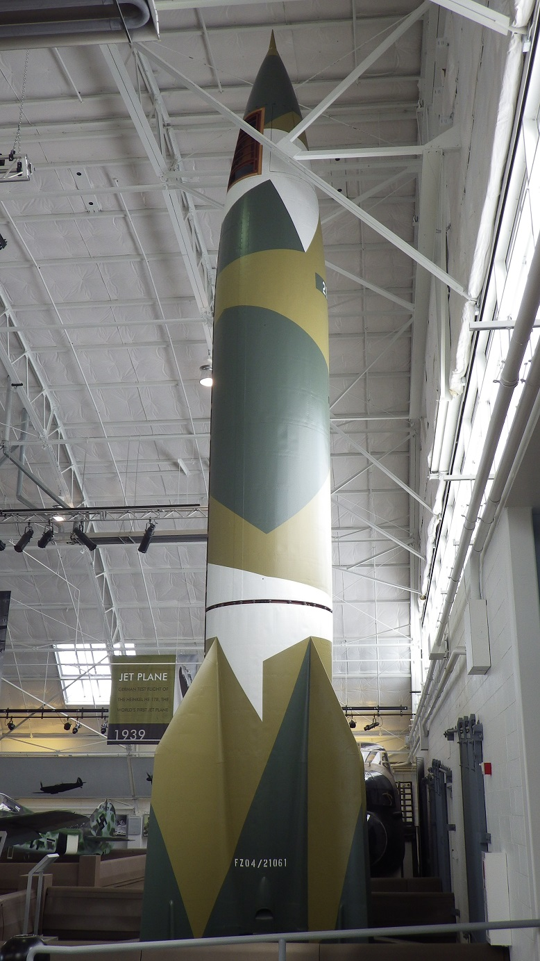 V-2 Rocket Flying Heritage Collection